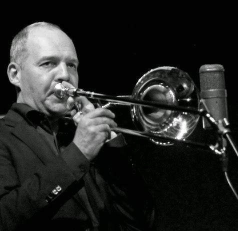 Günther Bollmann auf dem Jazzfestival St. Ingbert 2015